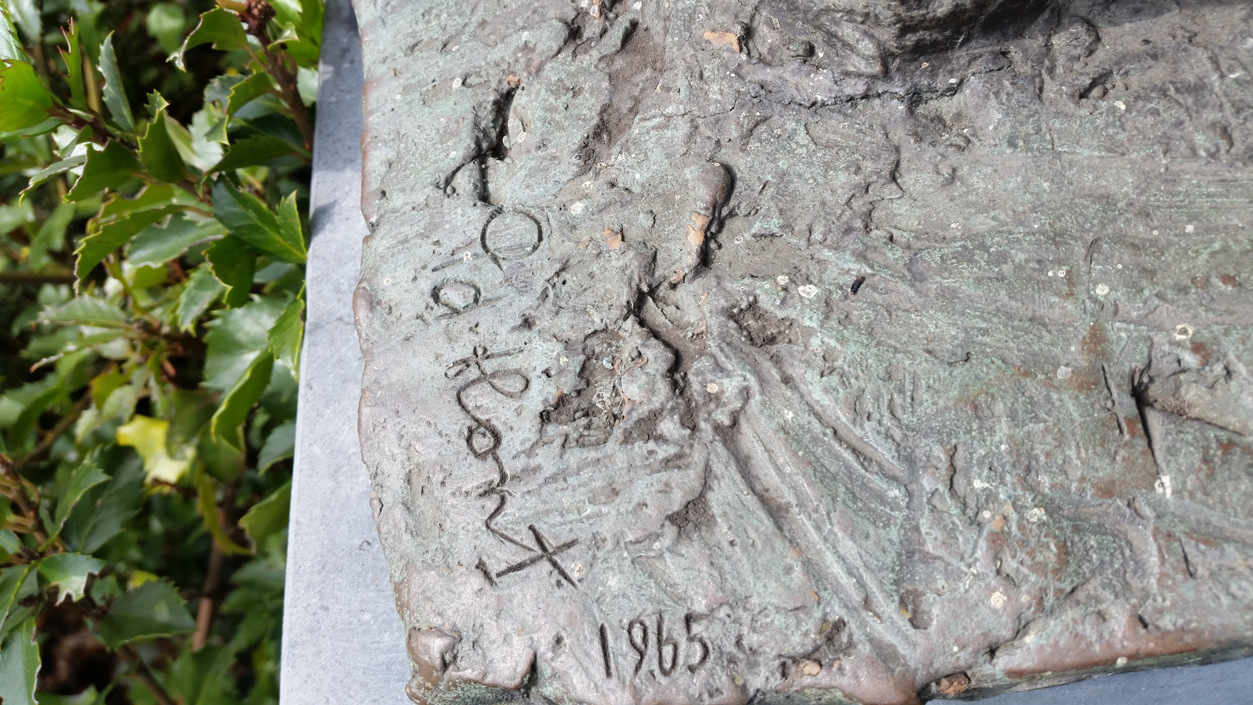 Signatuur en datering Beursmannetje (Pieter d'Hont)